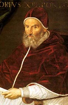 Bild von Papst Gregor XIII. (Ausschnitt aus dem bereits hochgeladenen lizenzierten Bild)